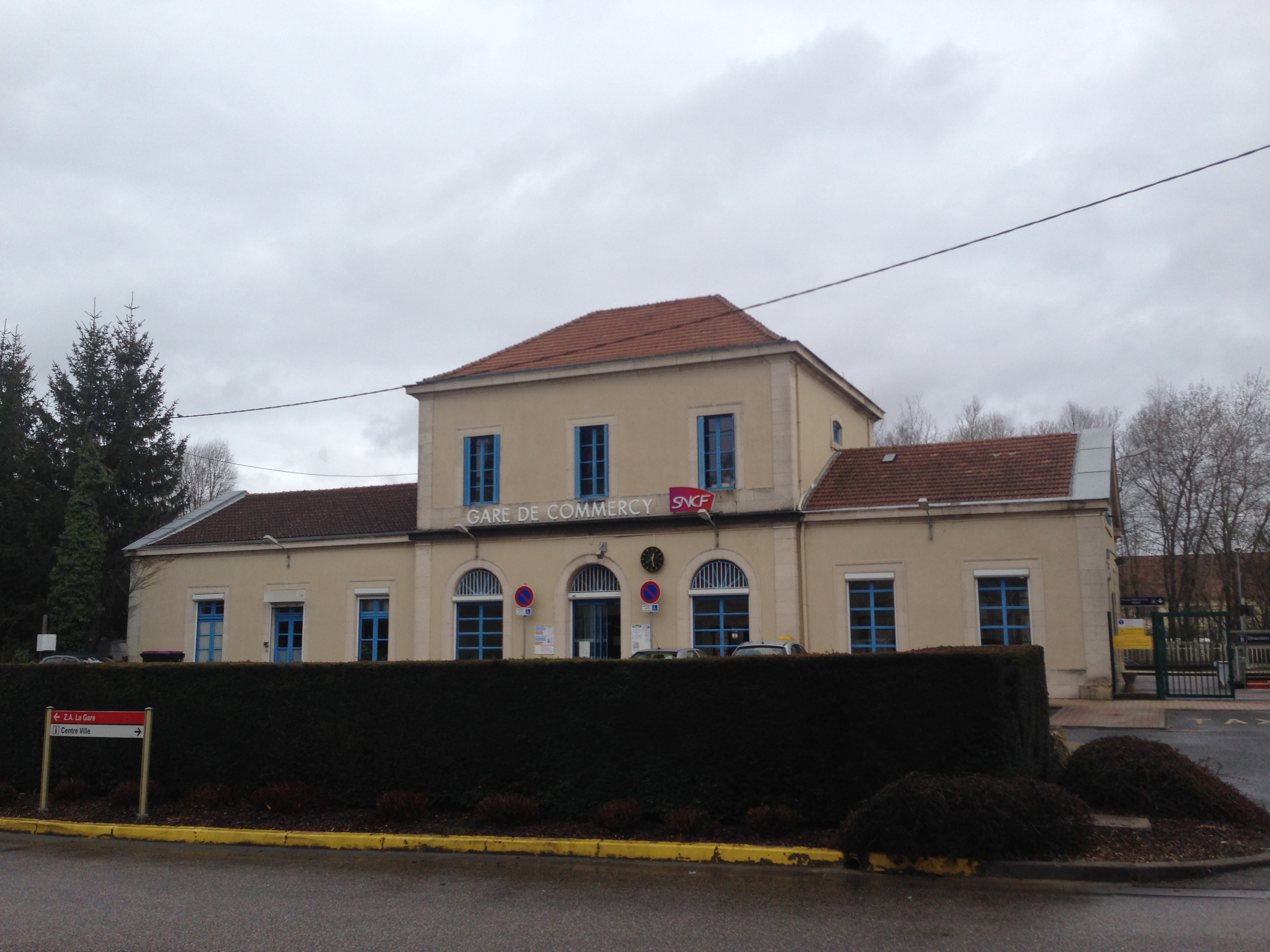 Gare de Commercy en Mars 2015